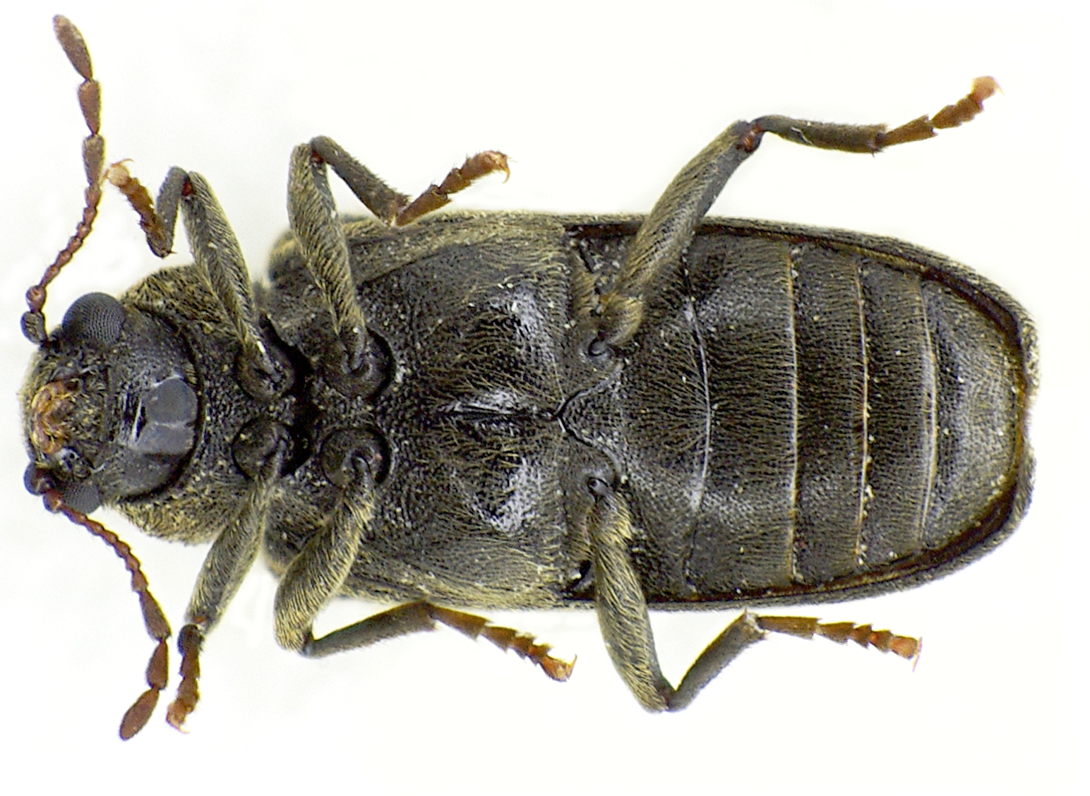 Grynobius planus aus Baden-Württemberg zwischen Rottweil und Tuttlingen, 700 m hoch, am 5. Mai 2914, Unterseite